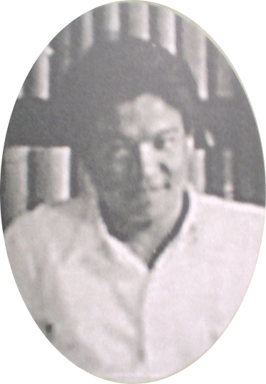 植村吉明照